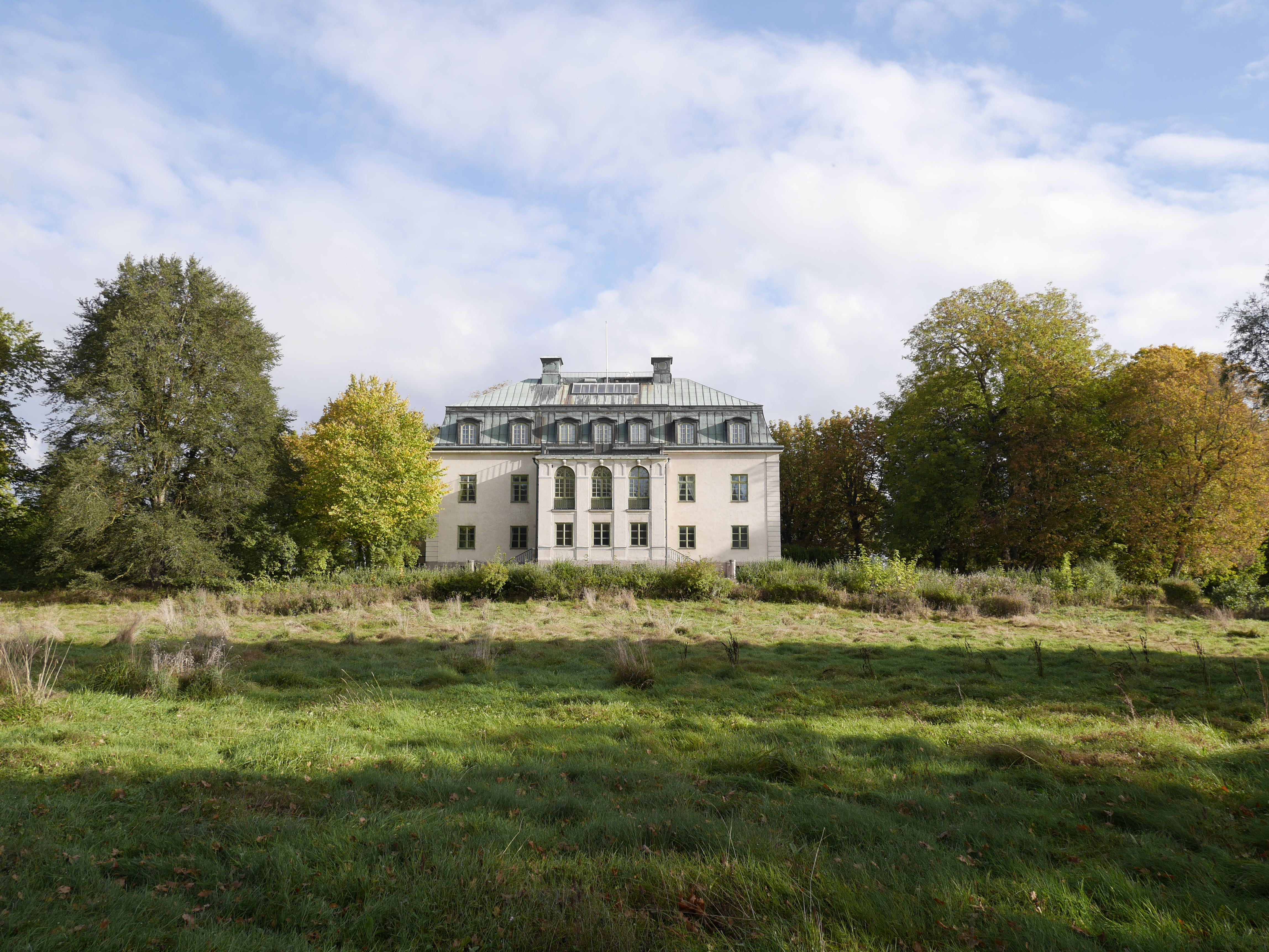 Krusenhofs gård